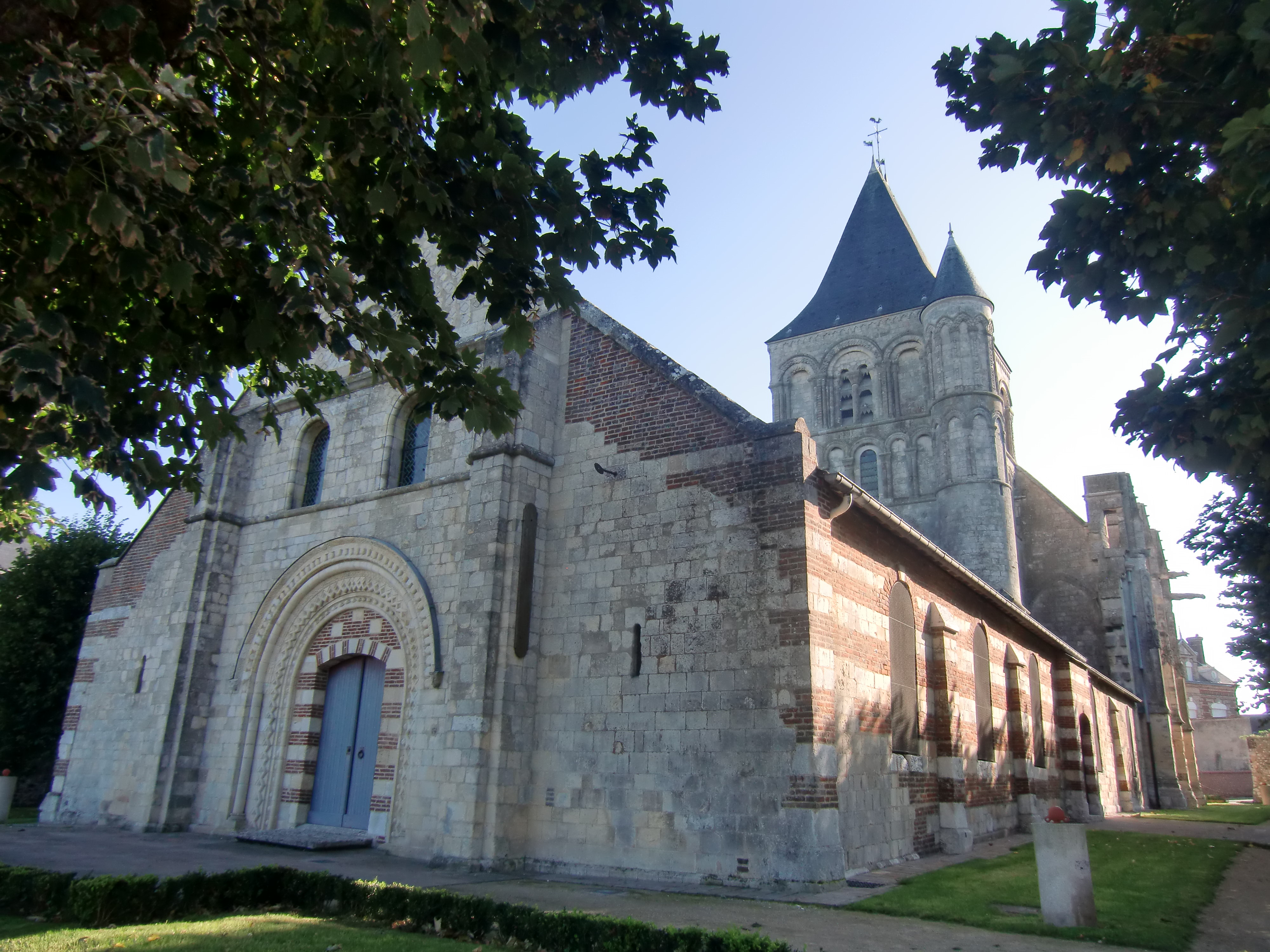 Eglise de Quillebeuf (Eure, Normandie, France)